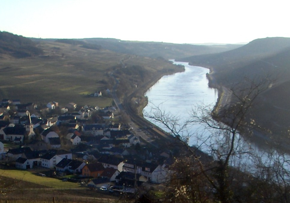 Die Obermosel bei Nittel im Februar 2008.